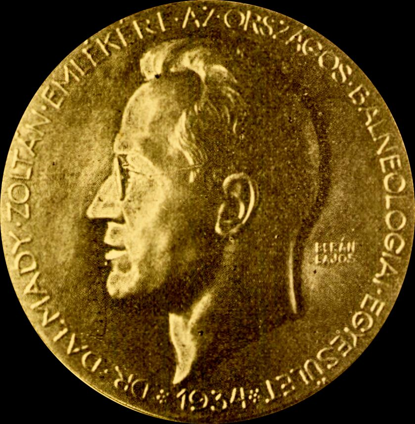 Dalmady Zoltán Lipót Sándor (Budapest, 1880. március 15. – Budapest, 1934. október 17.) orvos, sportorvos, balneológus.